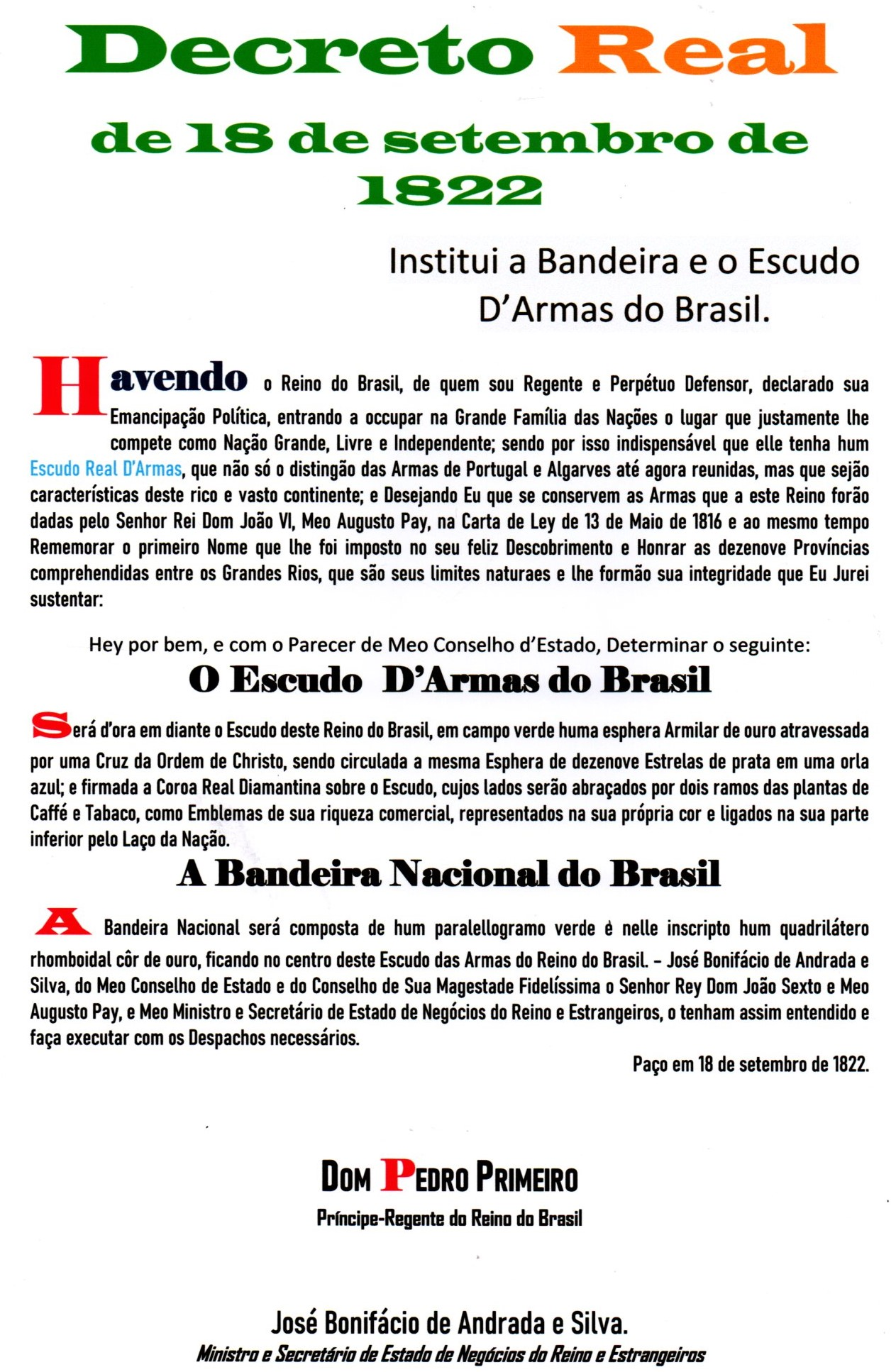 Réplica do decreto em que Dom Pedro I institui o brasão e a bandeira do Brasil.